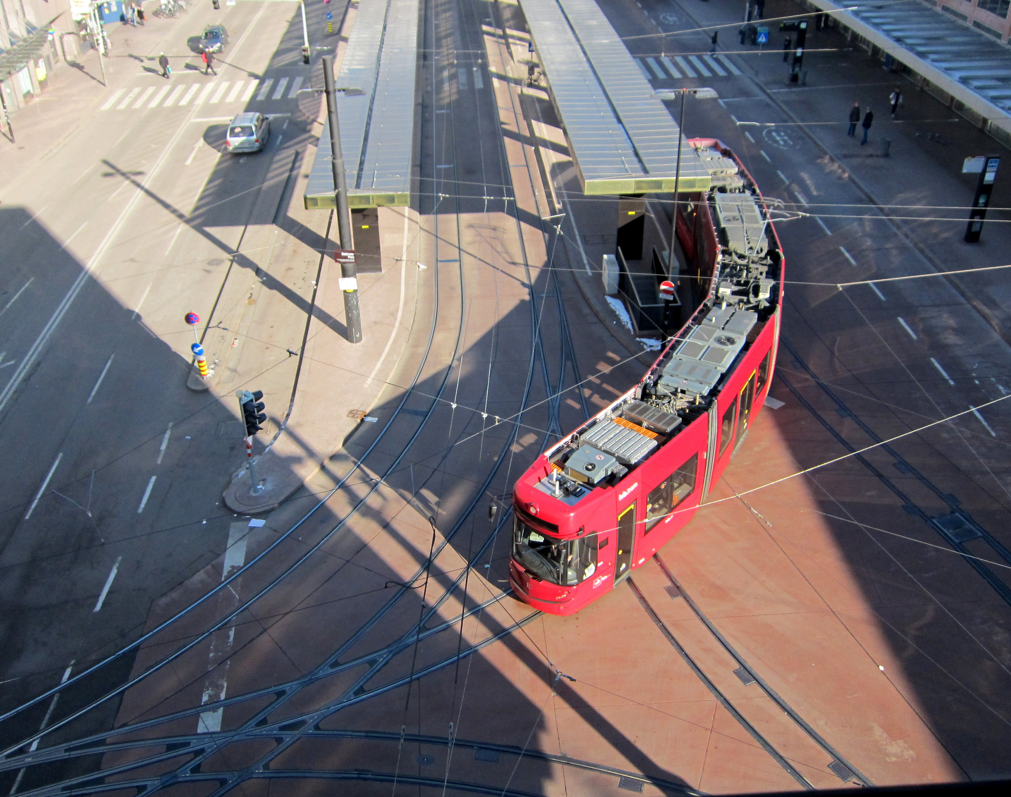 Niederflurtriebwagen der Stubaitalbahn verlässt Innsbruck Hbf Richtung Fulpmes